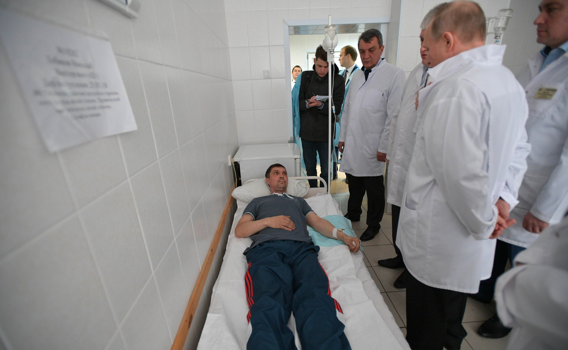 Владимир Путин навестил в больнице пострадавших при пожаре в Кемерове.